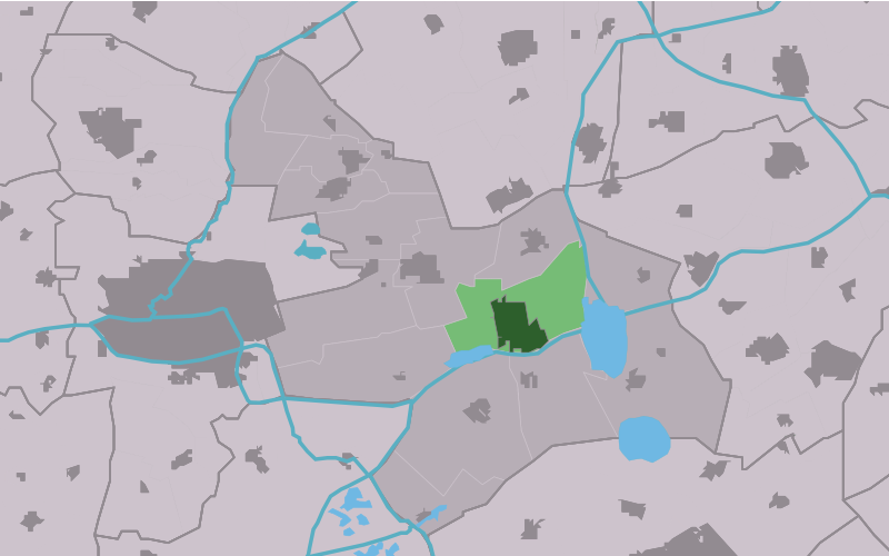 Kaartsje fan himrik fan Burgum